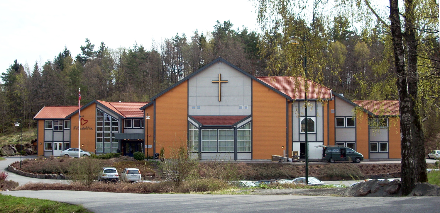 Filadelfia Arendal, Norway